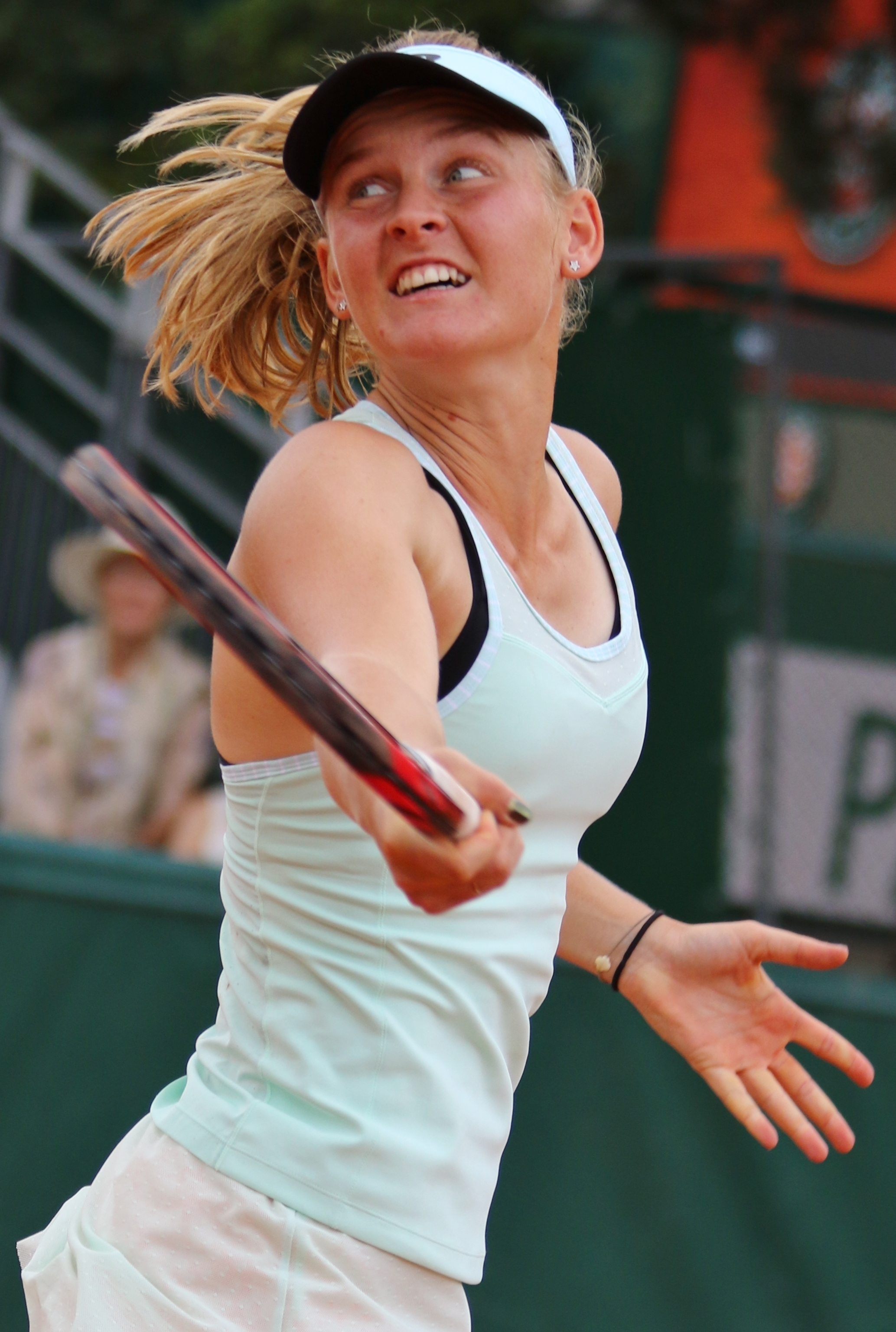 Ferro RG18 (1)